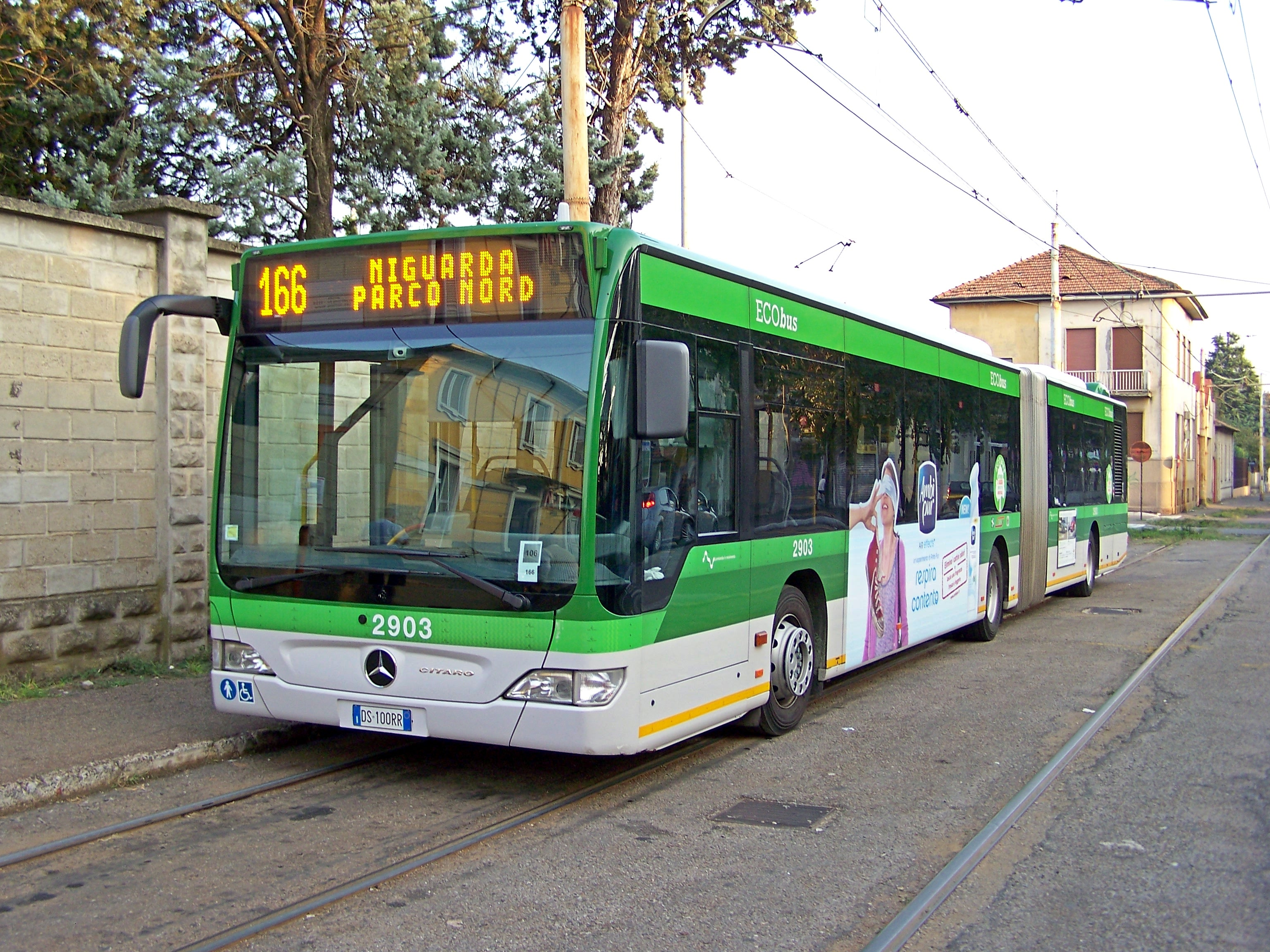 L'autosnodato Mercedes Citaro G nr. 2903 dell'ATM in livrea Ecobus sosta sui binari del raddoppio di Desio Deposito dopo che il bloccato 831+801+832 ha svolto la manovra di ribattimento.